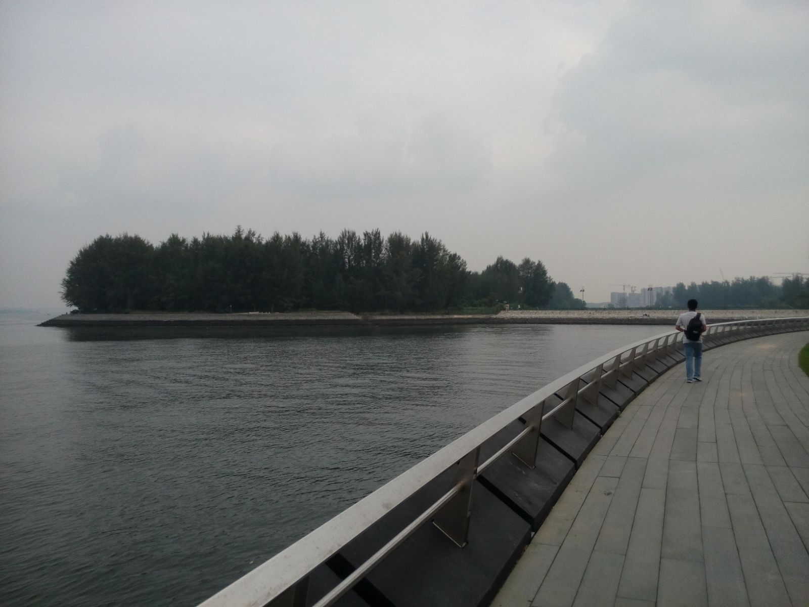 新加坡科尼岛